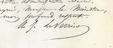 Signature de Urbain Le Verrier (1811-1877).